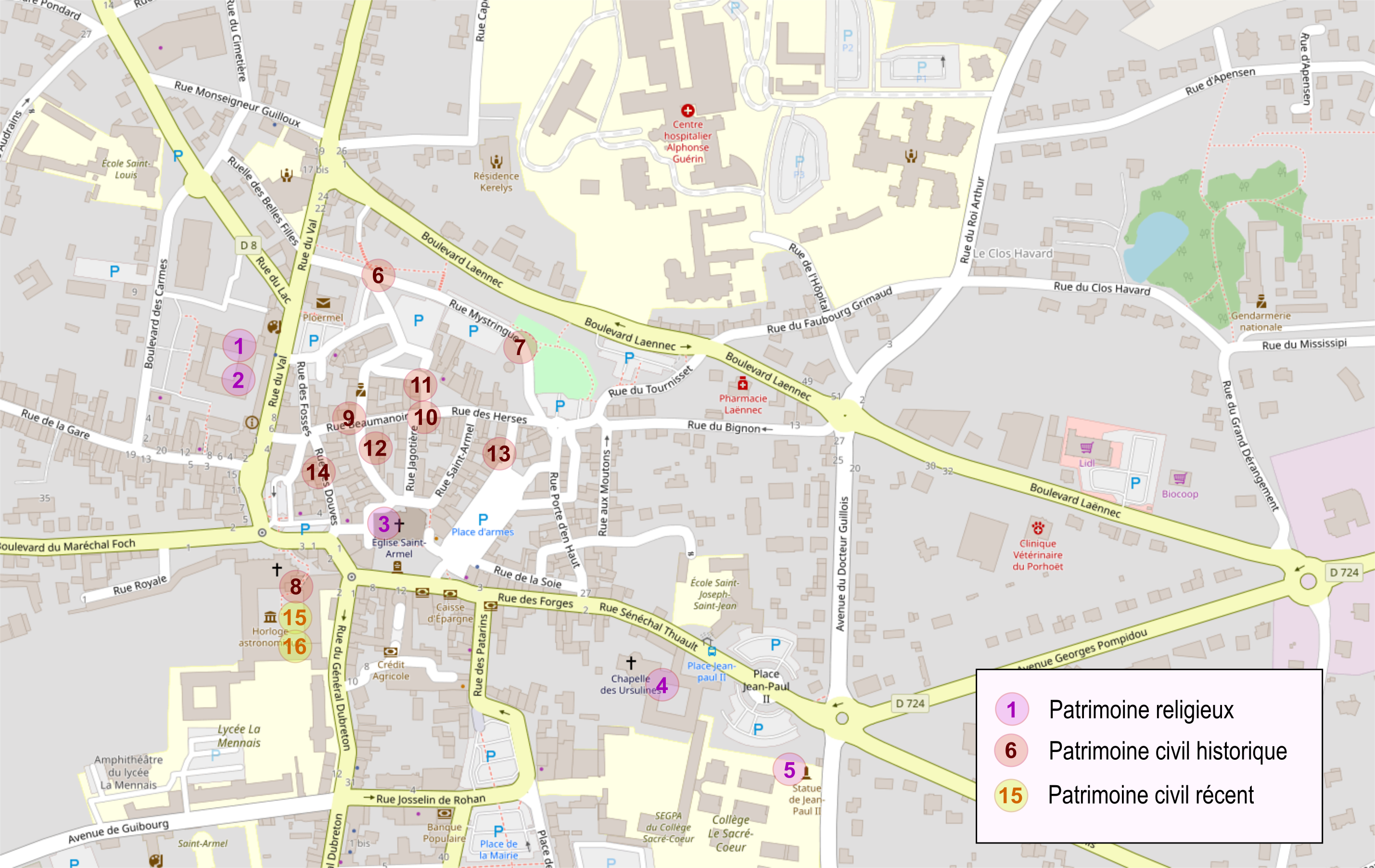 Carte de localisation des monuments d'intérêt historique de la commune de Ploërmel (France).